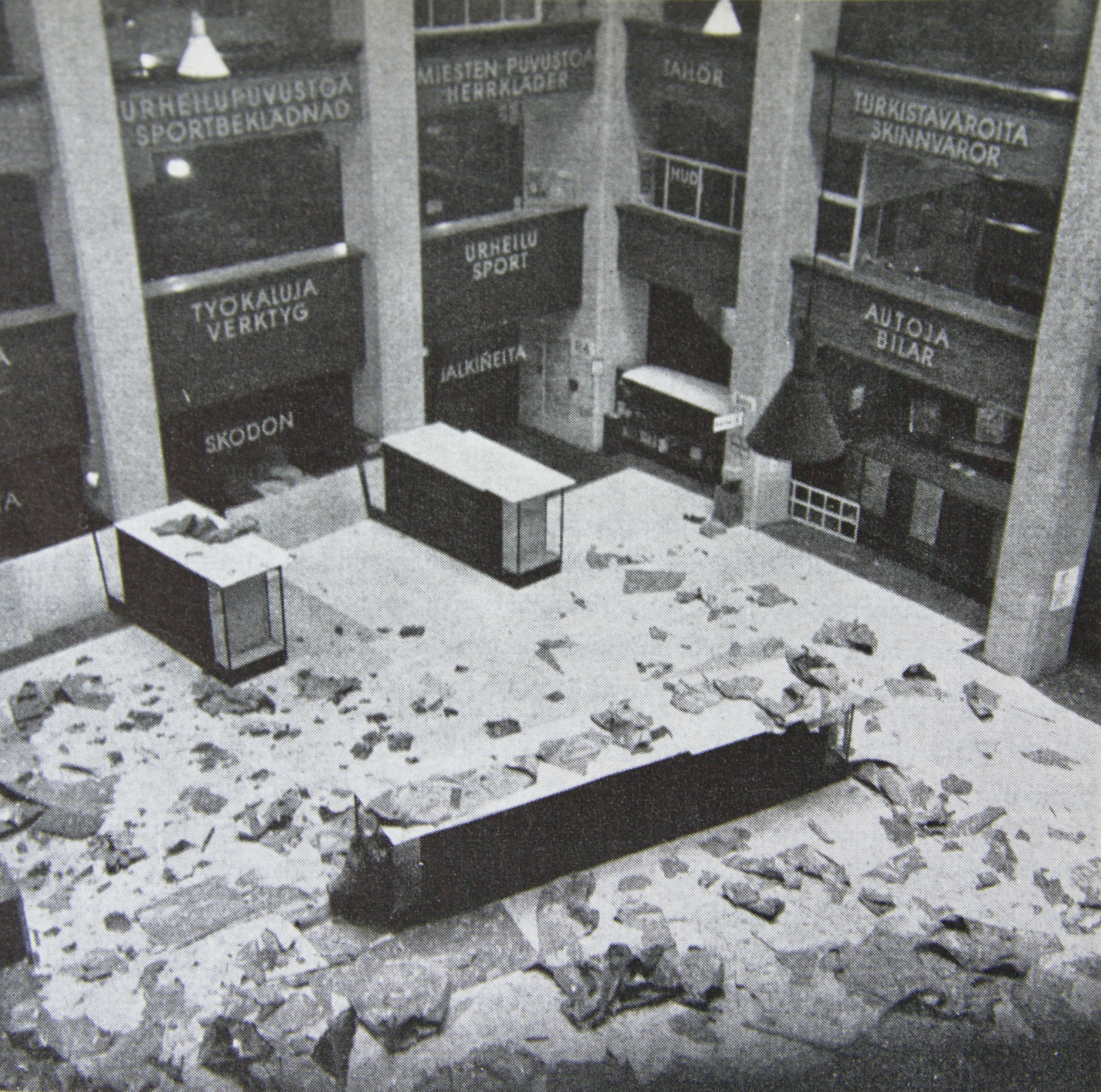 Stockmannin valopiha Helsingin suurpommitusten jäljiltä 26. helmikuuta 1944.